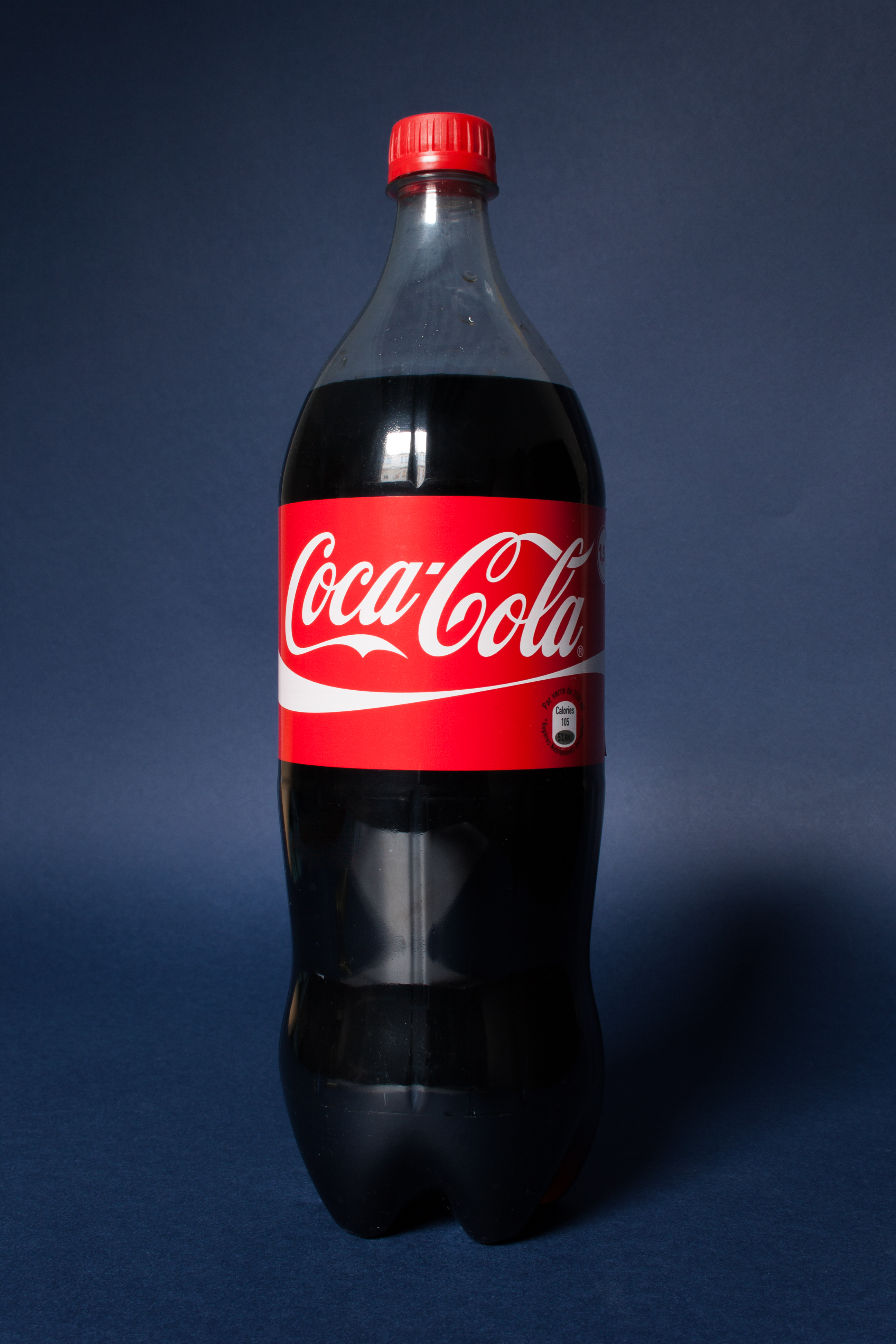 Bouteille de Coca-Cola d'un litre cinq commercialisée en France.